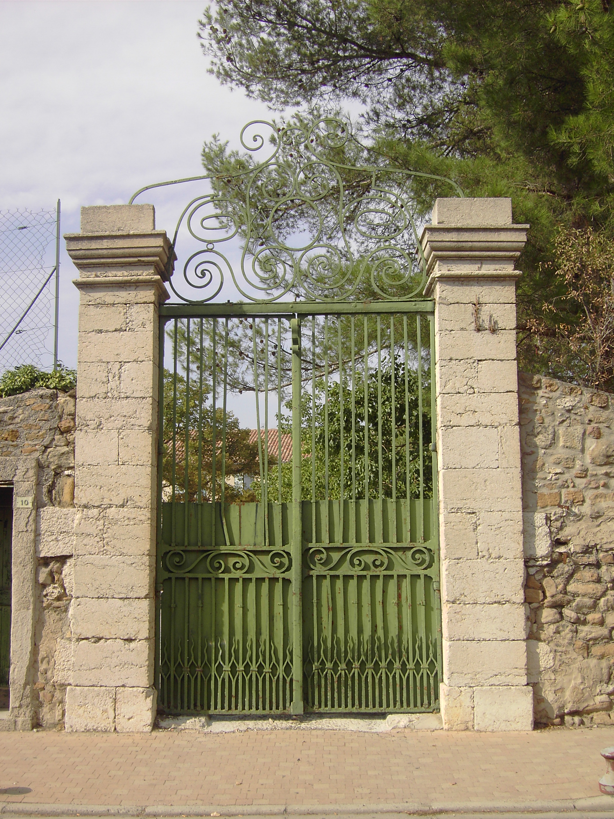 Portail monumental du jardin construit en 1769